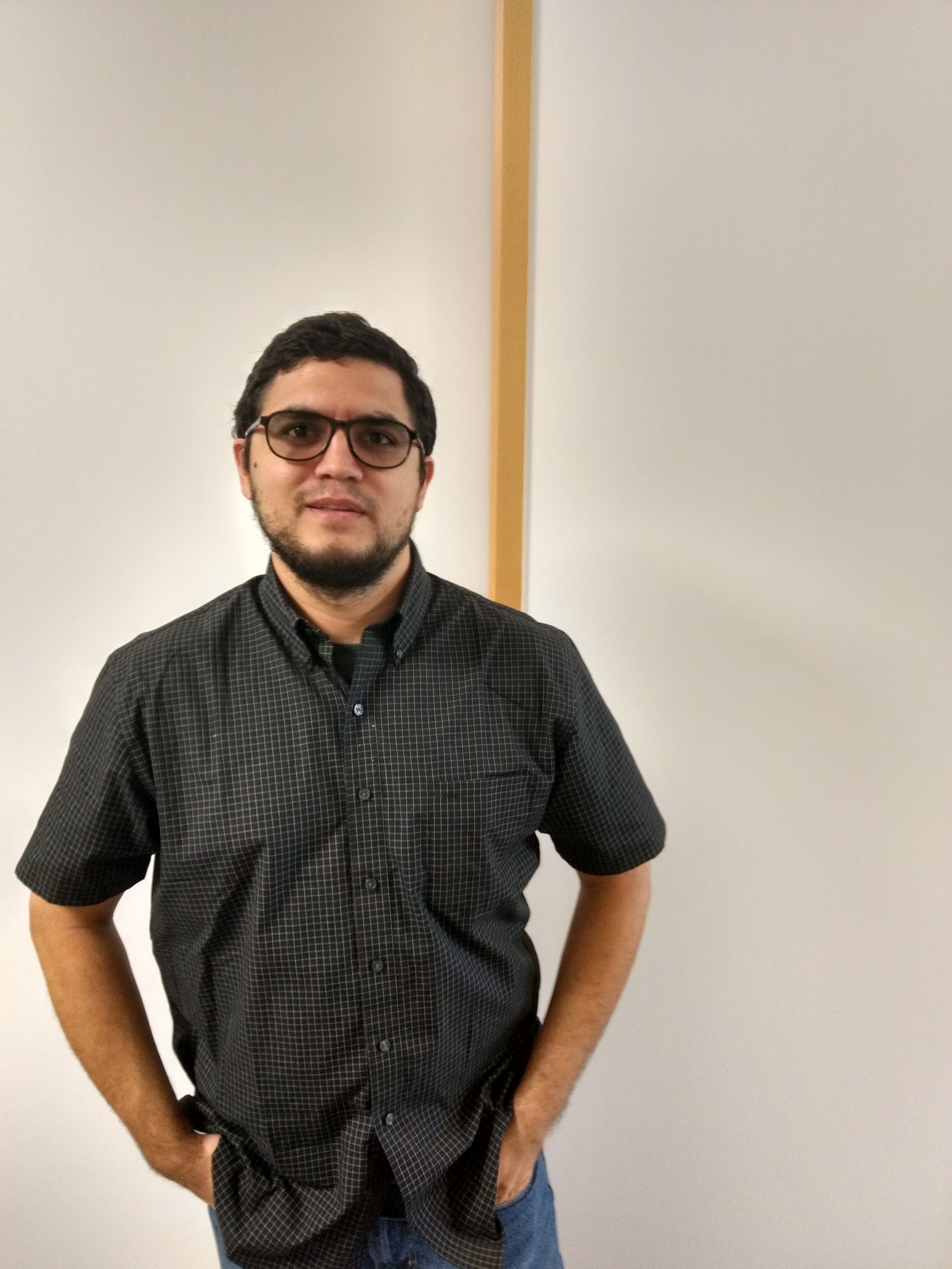 Luis Carlos Díaz a la Ràdio de la Universitat Politècnica de València, abans de gravar per a La Represa.